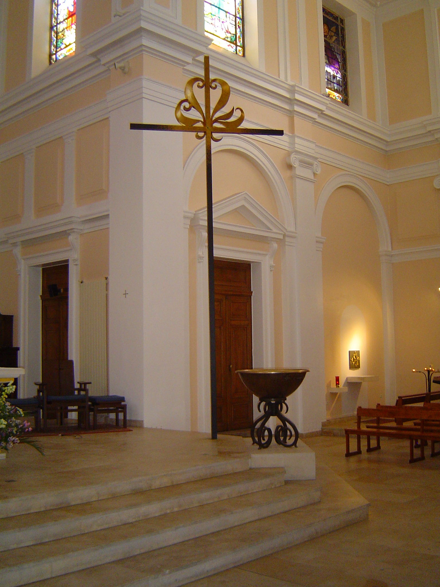 Photos prises à Bourg-la-Reine, commune française des Hauts-de-Seine